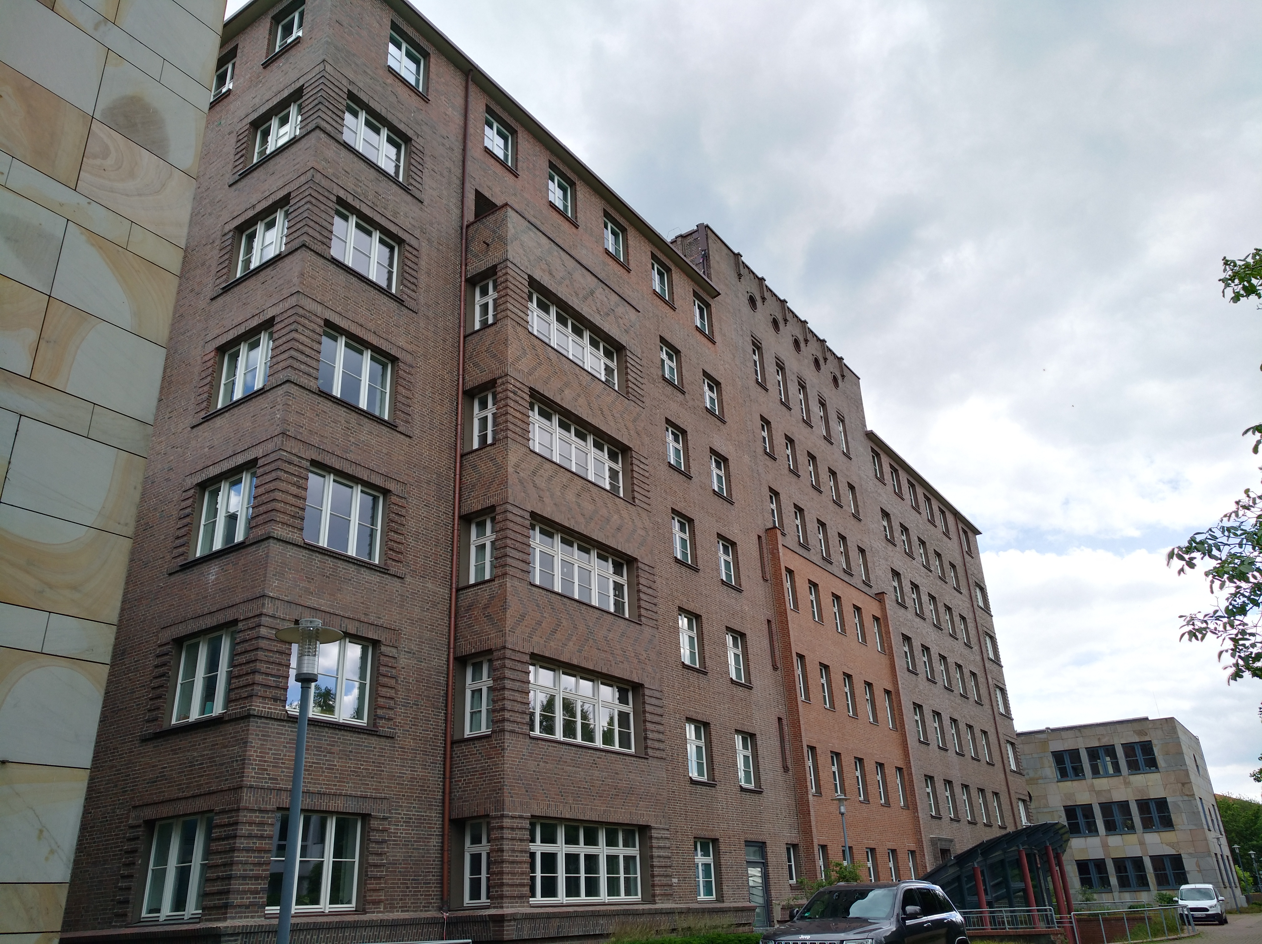 Rückseite des Stadthauses 1 in Osnabrück, ehem. Stadtkrankenhaus